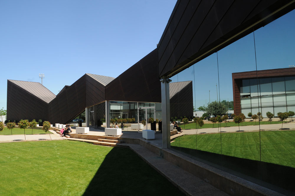 Fotografía de la Sede de Nuestra Señora del Lluch del Campus de la Ribera